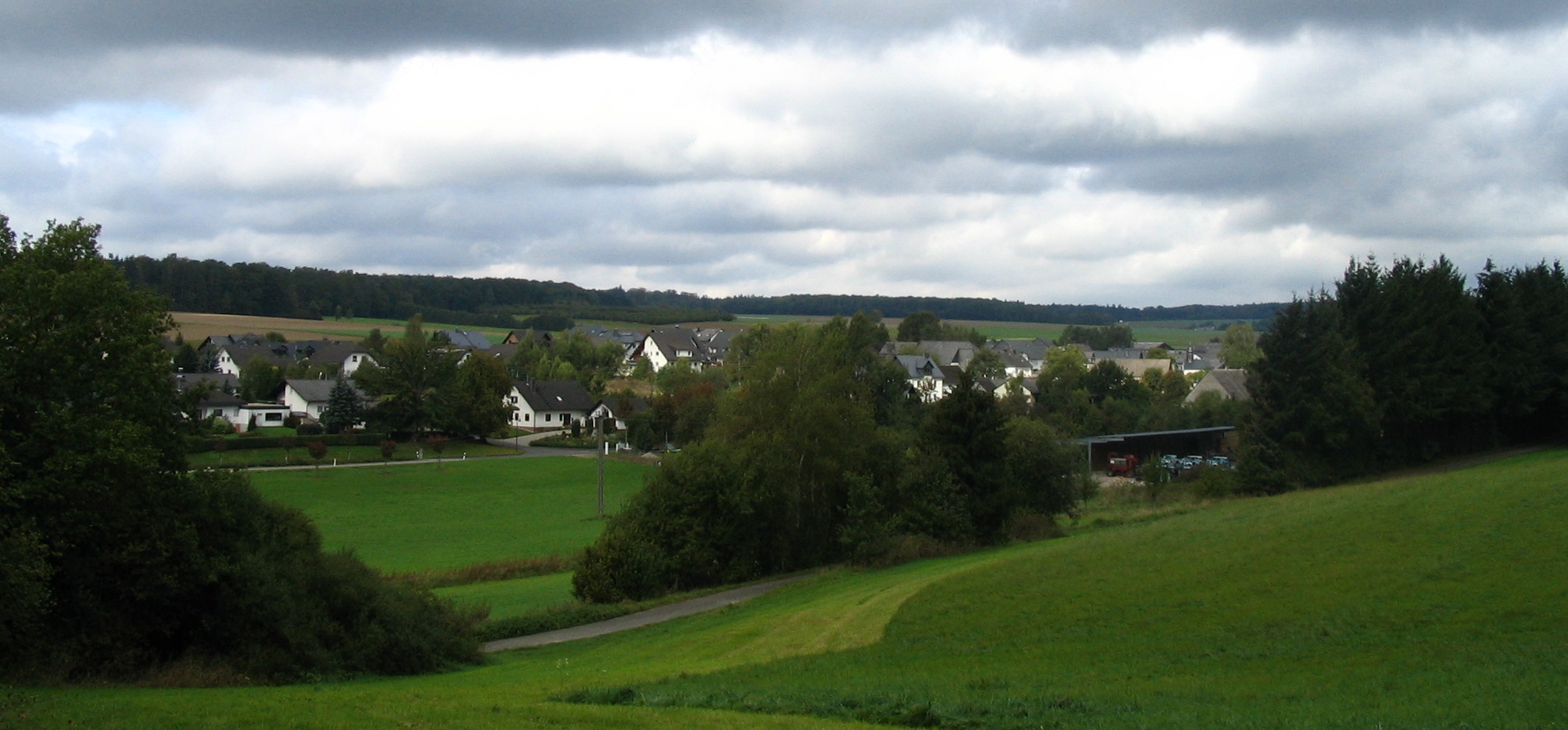 Niederkumbd (Hunsrück) aus süd-östlicher Richtung